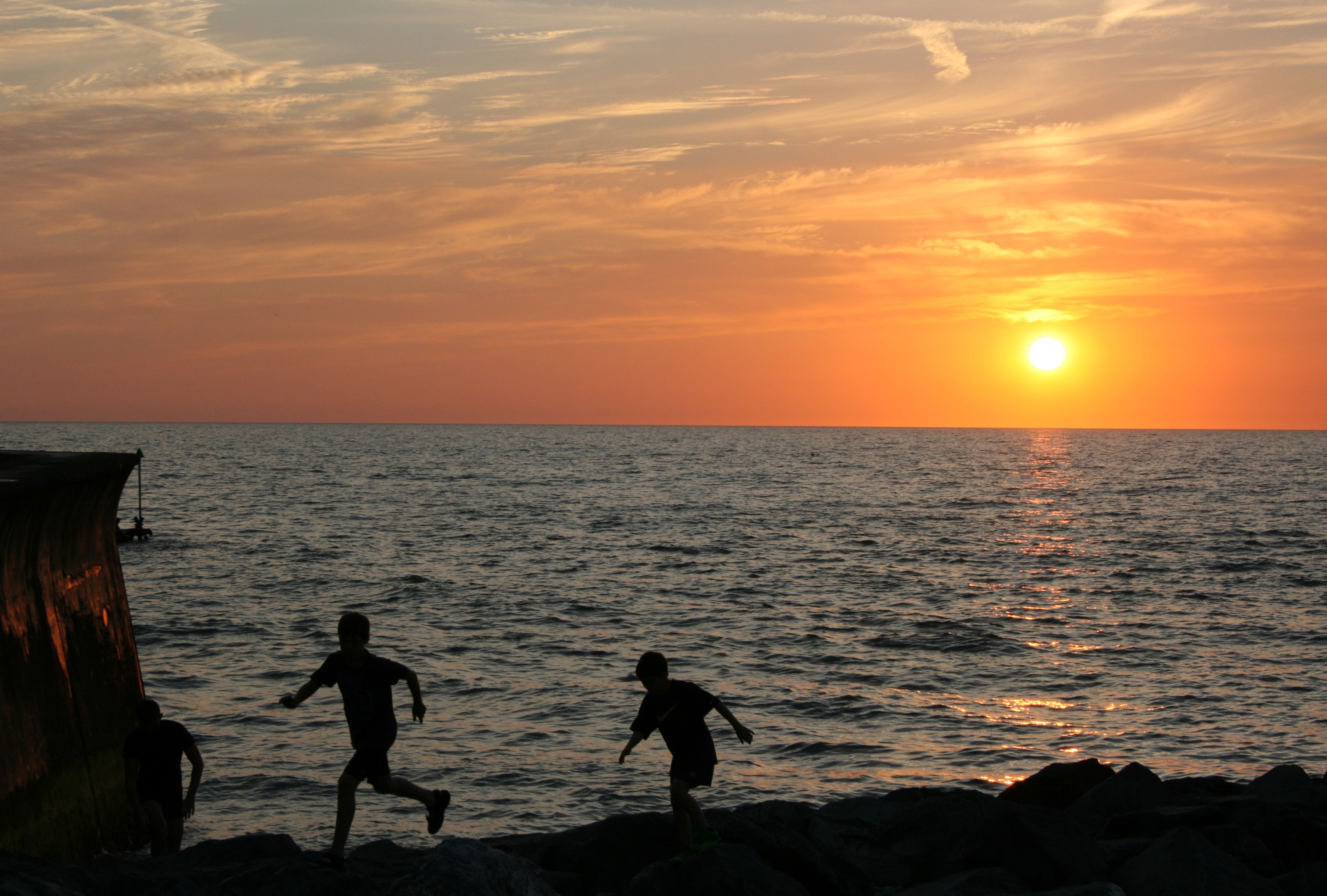 Machlud yr haul yn Aberaeron ... Sunset in Aberaeron